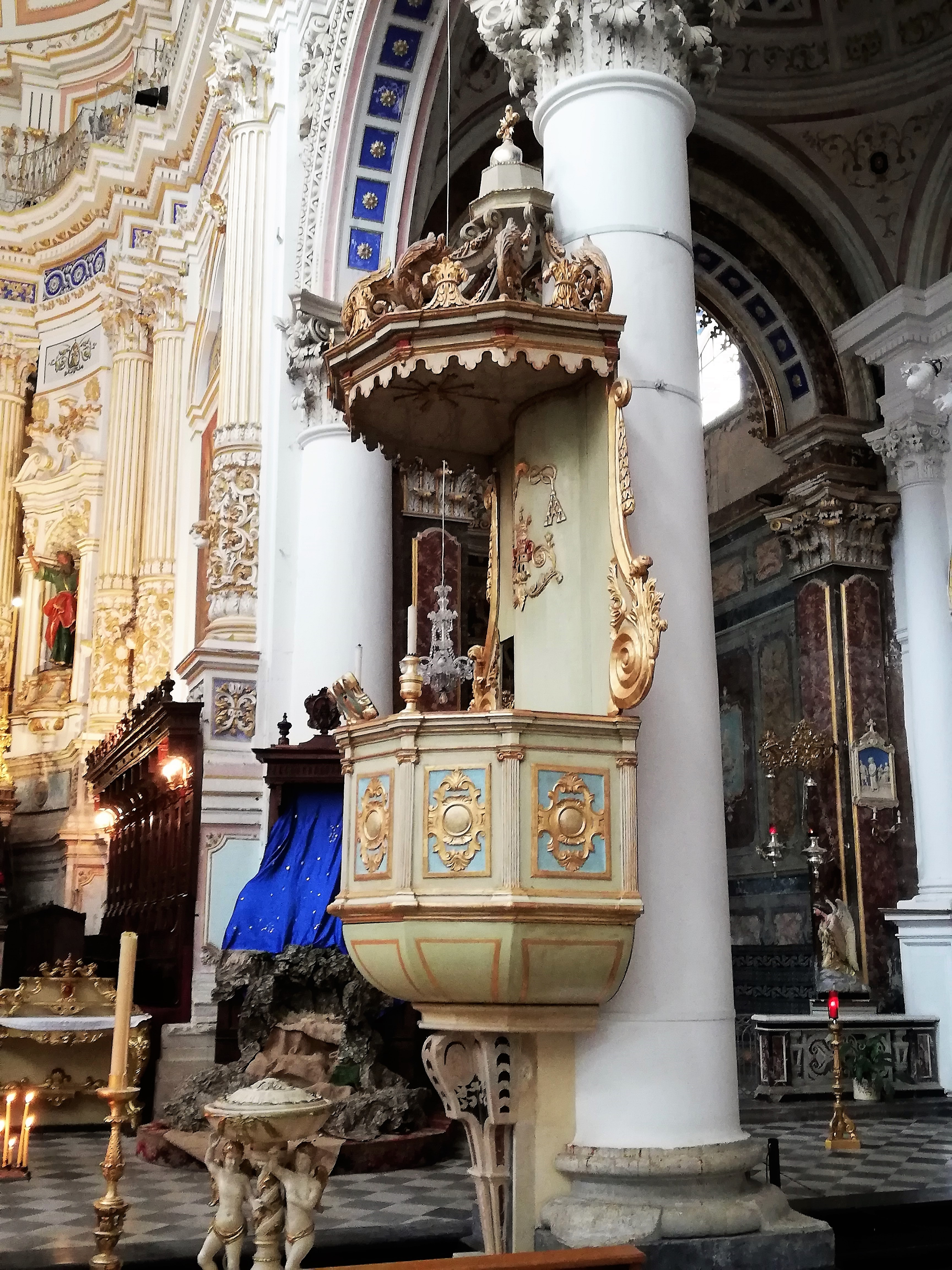 Pulpito ligneo.